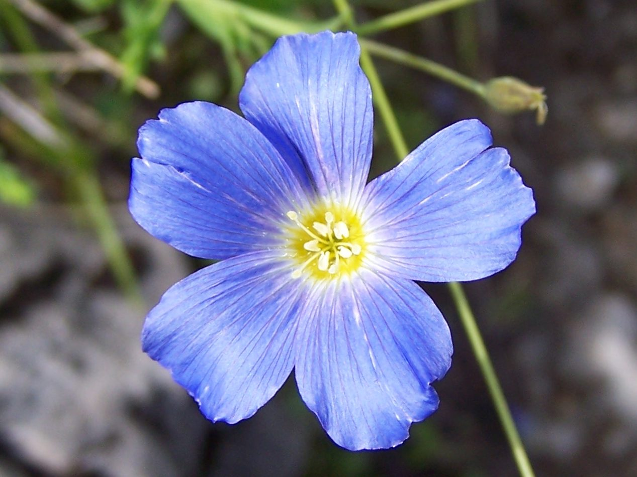 Linum extraaxillare (pl. len karpacki), habitat: Tatra Mountains, Hala Upłaz, Skała Piec